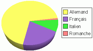 Diagramme des langues Suisse crée par Rinaldum pour wikipedia sous double licence GPL et GFDL crée avec Open Office Rinaldum